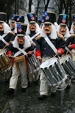 Basler Fasnacht 05